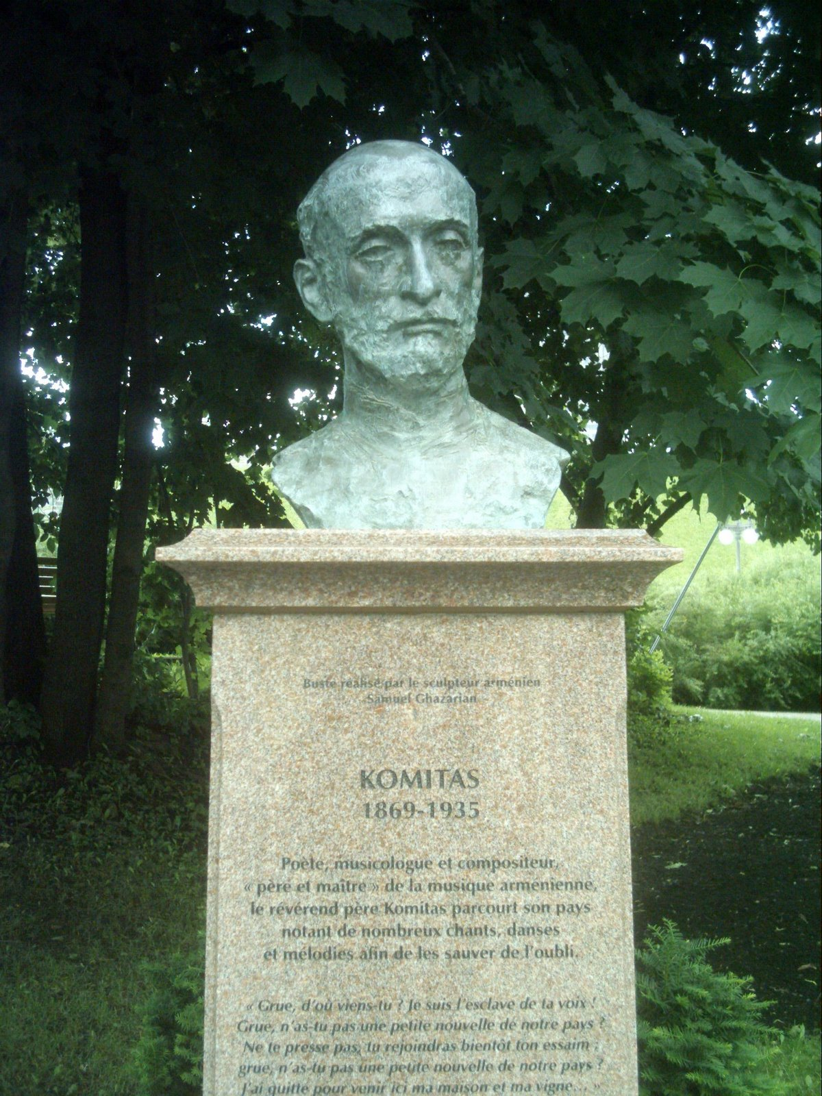 Komitas, poète arménien, monument à Québec